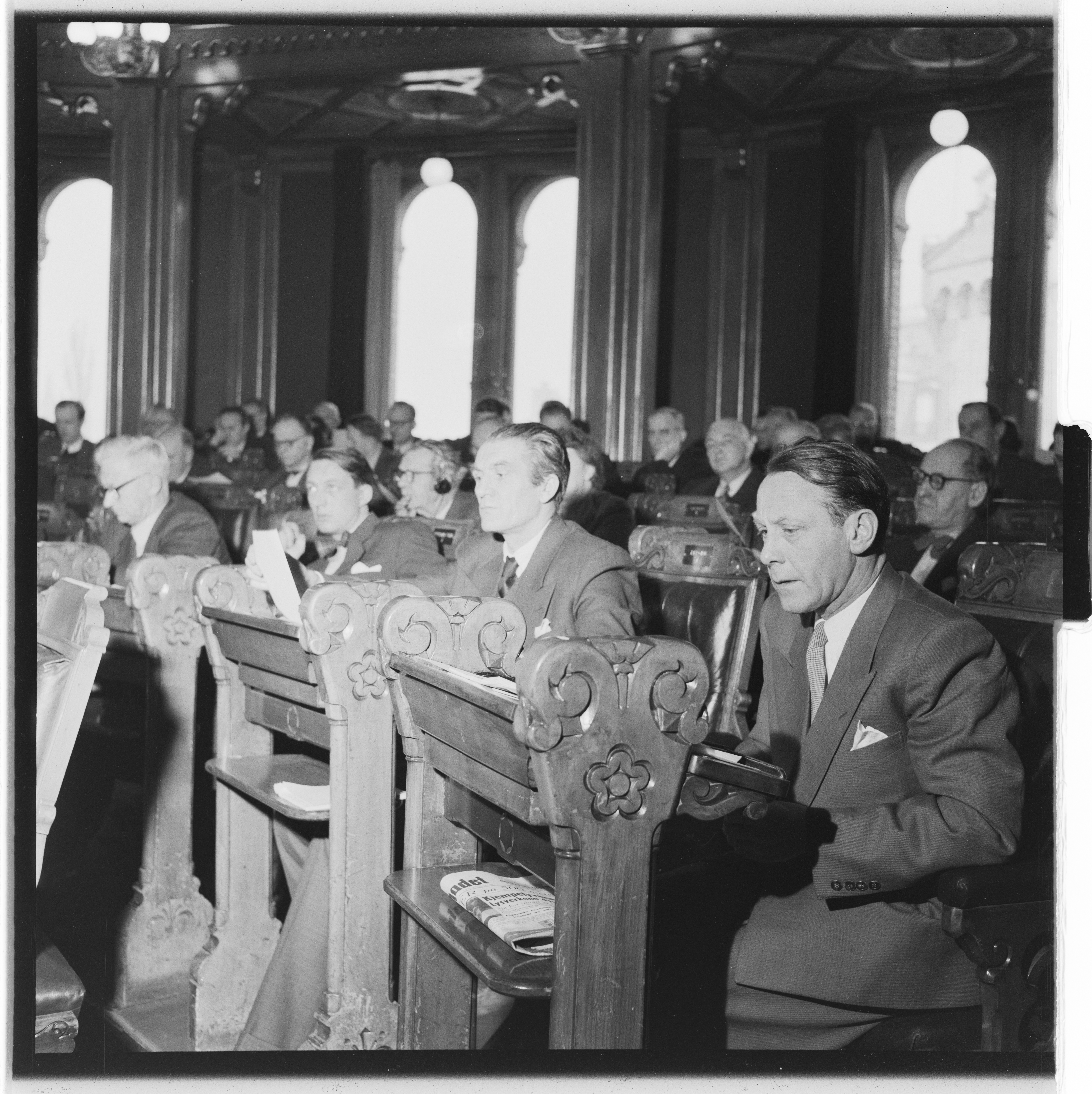 Bildet er hentet fra Arkivverket. Stortinget 1954. NÅ nr. 3, 1954. Arkivinstitusjon : Riksarkivet Arkivnavn : Billedbladet NÅ Sted : Norge, Oslo, Oslo, Stortinget Emneord: Stortinget, Menn Avbildet: Kristian Asdahl, Torstein Selvik, Henrik Svensen